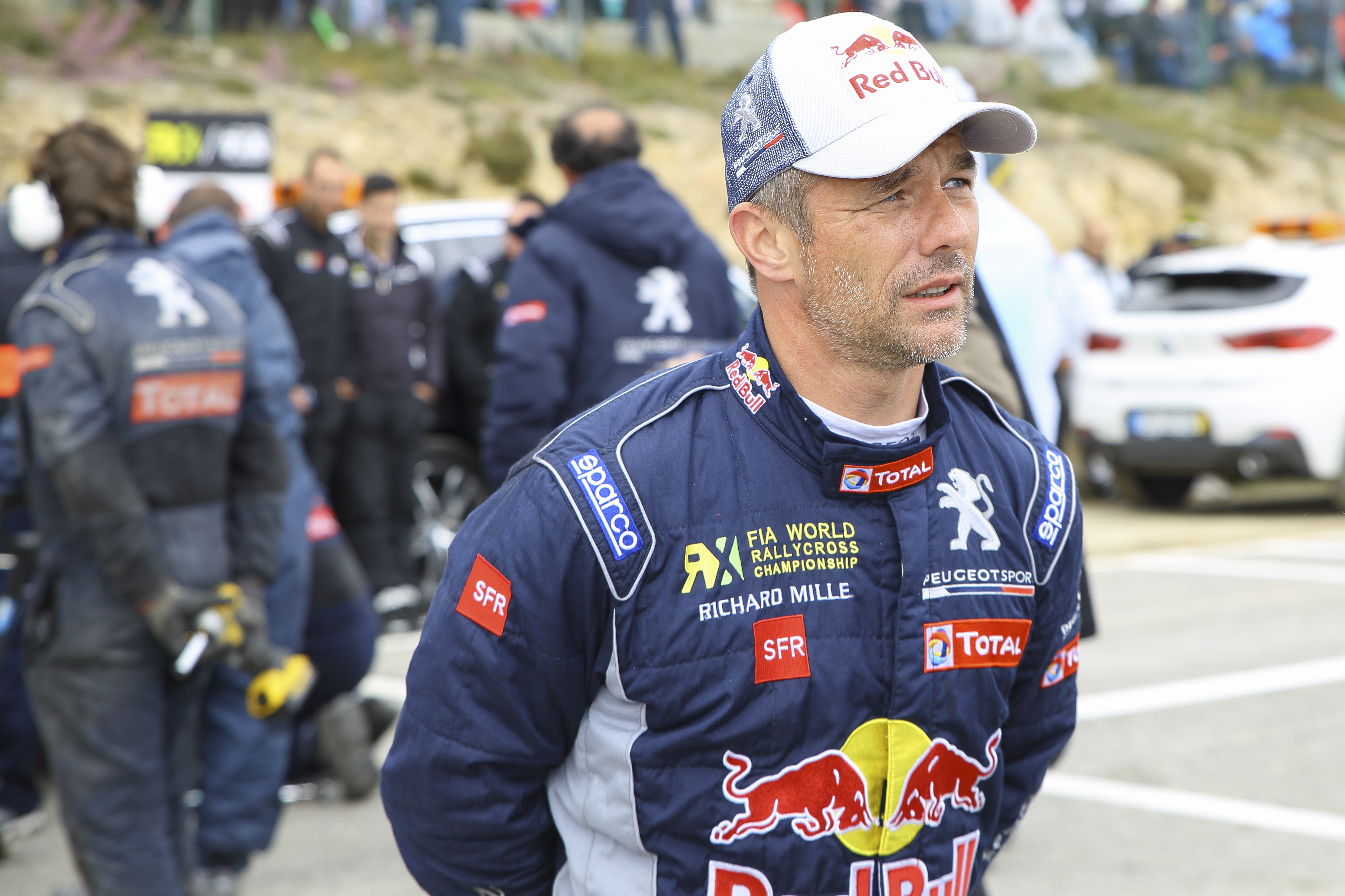 Johan Kristofferssonganó en la final en Portugal, tras hacerlo en España, el Sueco se afianza en el liderato provisional del Campeonato. Sin embargo no fue el mejor en las mangas de entrenamiento que fueron dominadas por Andreas Bakkerud.